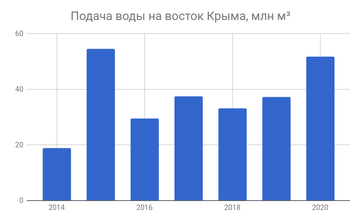 Подача воды на восток Крыма по Северо-Крымскому каналу в 2014..2017 годах